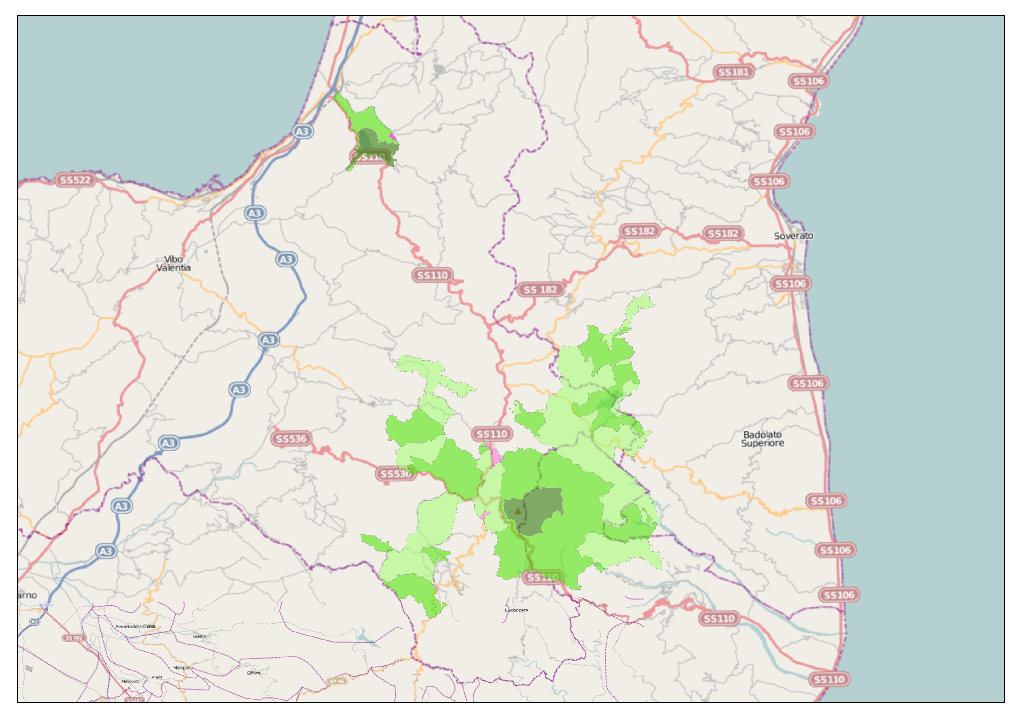 Carta del Parco Naturale Regionale delle Serre